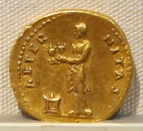 Palazzo Massimo alle Terme